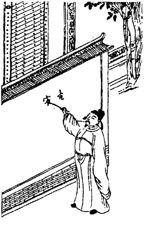 有像列仙全傳《劉海蟾》